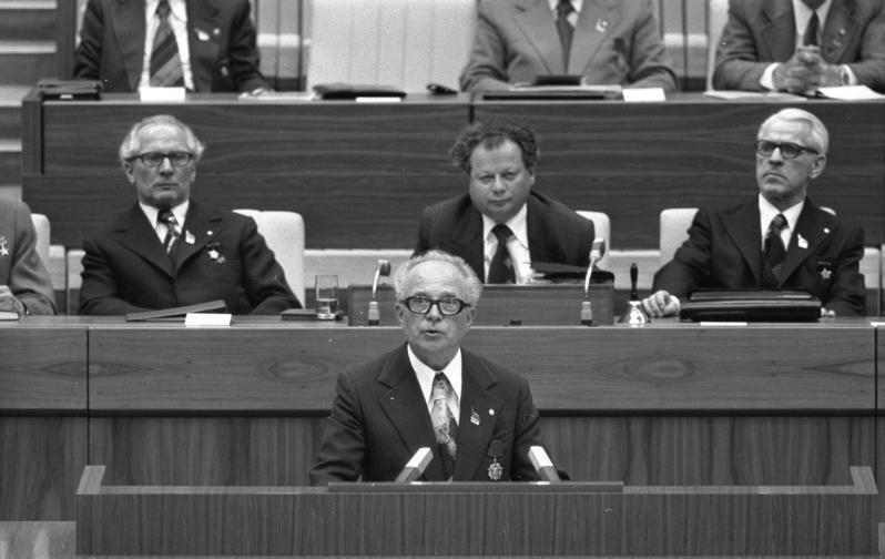 Berlin, IX. SED-Parteitag, Kurt Seibt ADN-ZB/18.5.76/Berlin: Parteitag Der Vorsitzende der Zentralen Revisionskommission der SED, Kurt Seibt (Mitte), erstattete am Schluss des ersten Beratungstages des IX. Parteitages den Bericht der Zentralen Revisionskommission. Unser Foto zeigt im Hintergrund v.l.n.r. Erich Honecker, Erster Sekretär des ZK der SED, Hermann Axen, Mitglied des Politbüros und Sekretär des ZK der SED, und Wili Stoph, Mitglied des Politbüros des ZK der SED und Vorsitzender des Staatsrates der DDR. Abgebildete Personen: Honecker, Erich: Staatsratsvorsitzender, Generalsekretär des ZK der SED, DDR (GND 118553399) Seibt, Kurt: Vorsitzender der Zentralen Revisionskommission der SED, DDR Axen, Hermann: Politbüro des ZK der SED, Volkskammerabgeordneter, Friedensrat, DDR (GND 119328569) Stoph, Willi: Ministerpräsident, Staatsratsvorsitzender, Armeegeneral, SED, DDR